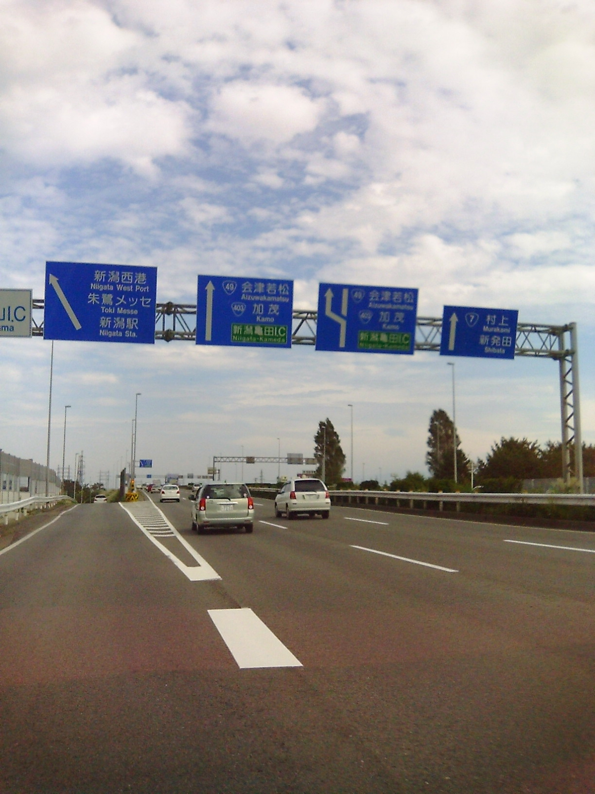 新潟バイパス紫竹山IC付近。